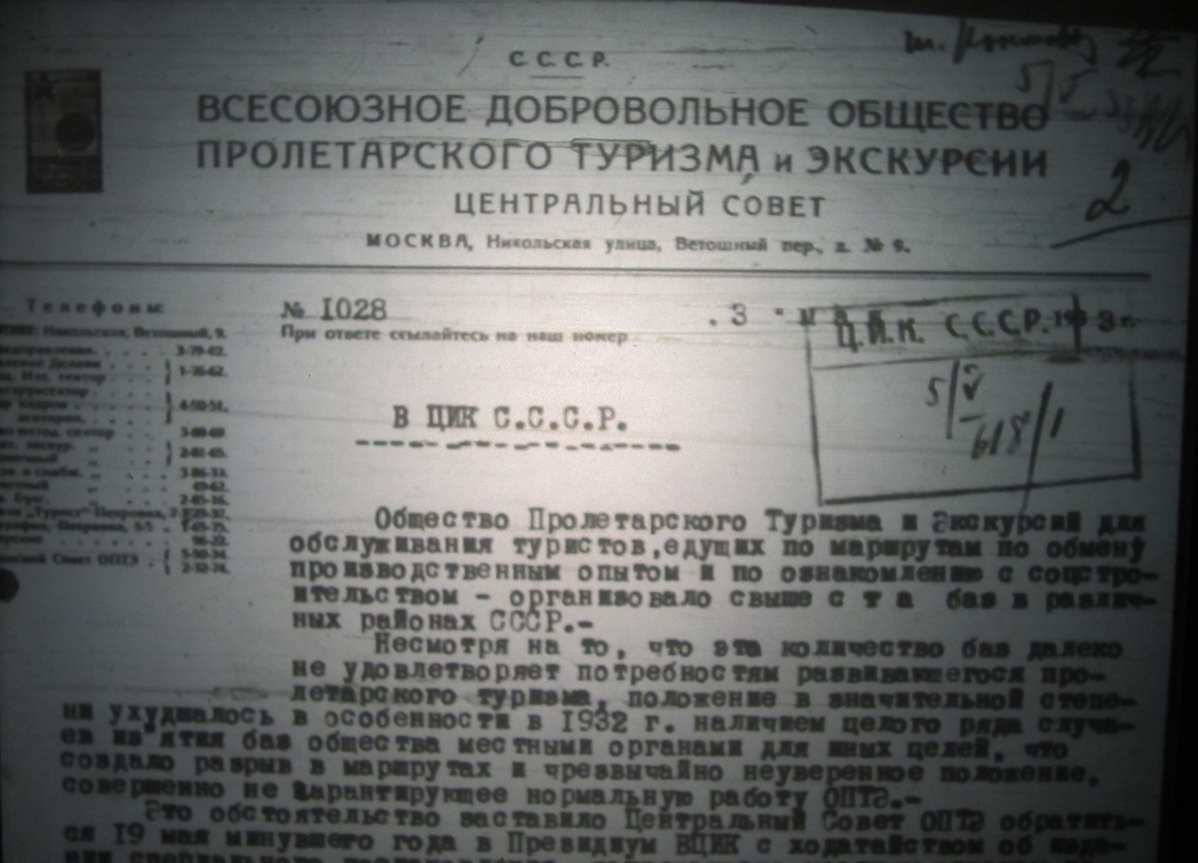 Бланк Общества пролетарского туризма и экскурсий. 1933 г. Источник: ГАРФ. Ф. Р3316. (ЦИК СССР). Оп. 26 (Дела Секретариата Президиума ЦИК Союза ССР. 1933 год). Д. 165 (Докладная записка о развитии организованного туризма и экскурсий и ряд мероприятий по докладу). Л. 2 (О туристах, едущих по маршрутам по обмену производственным опытом)